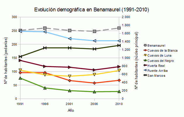 Evolución demográfica en el municipio de Benamaurel (España), por núcelos de población.